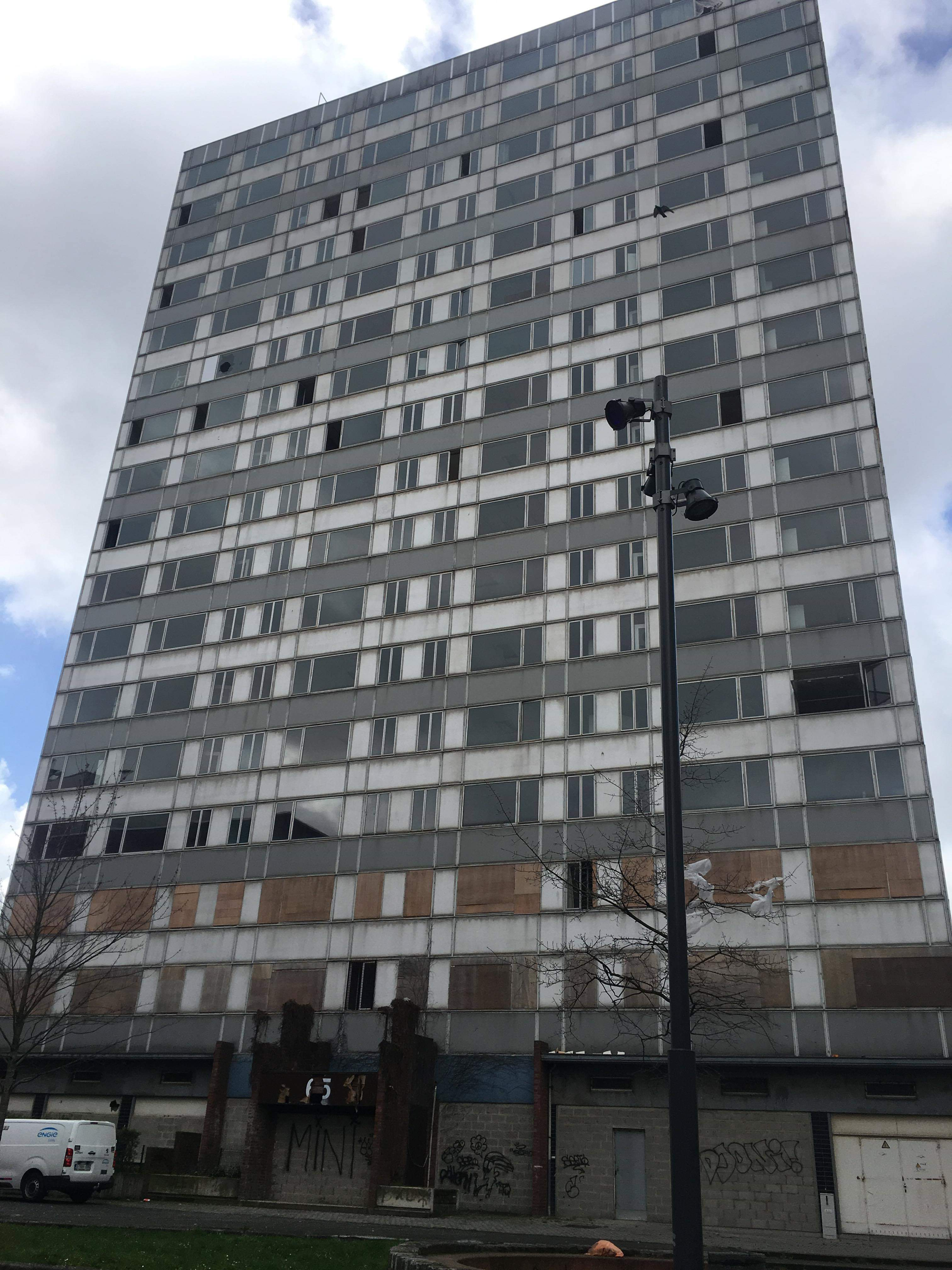 Een aanzicht van het gebouw vanuit de Fernand Brunfautstraat in Sint-Jans-Molenbeek. De deuren en de onderste ramen zijn dichtgemaakt.